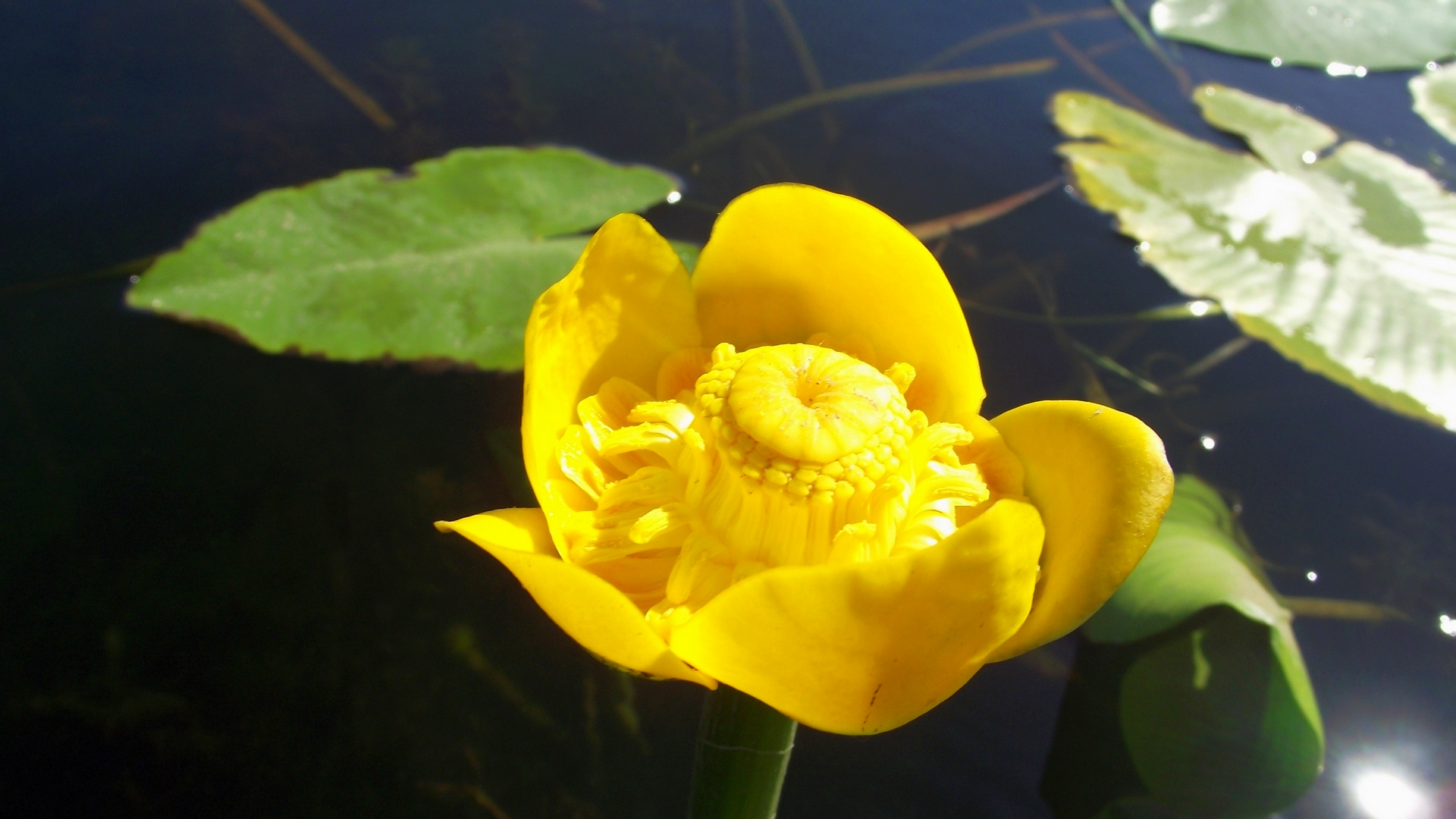 Водяная лилия, 18.09.15